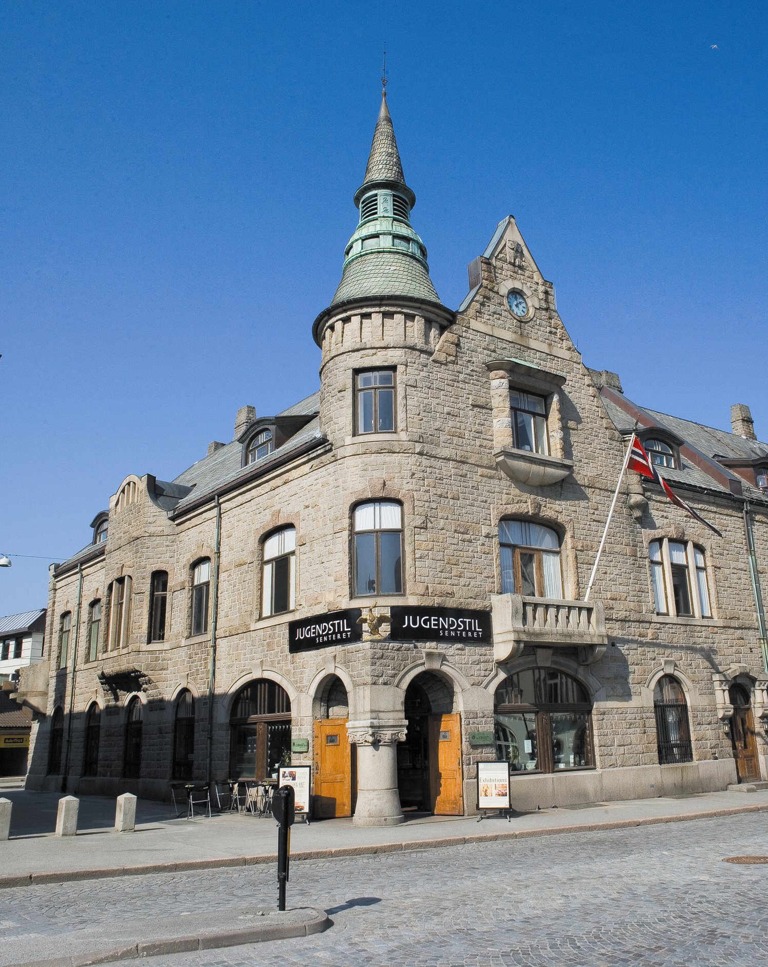 The former Swan Pharmacy in Ålesund, now housing Jugendstilsenteret Source: Jugendstilsenteret. Photo: Tony Hall/Jugendstilsenteret